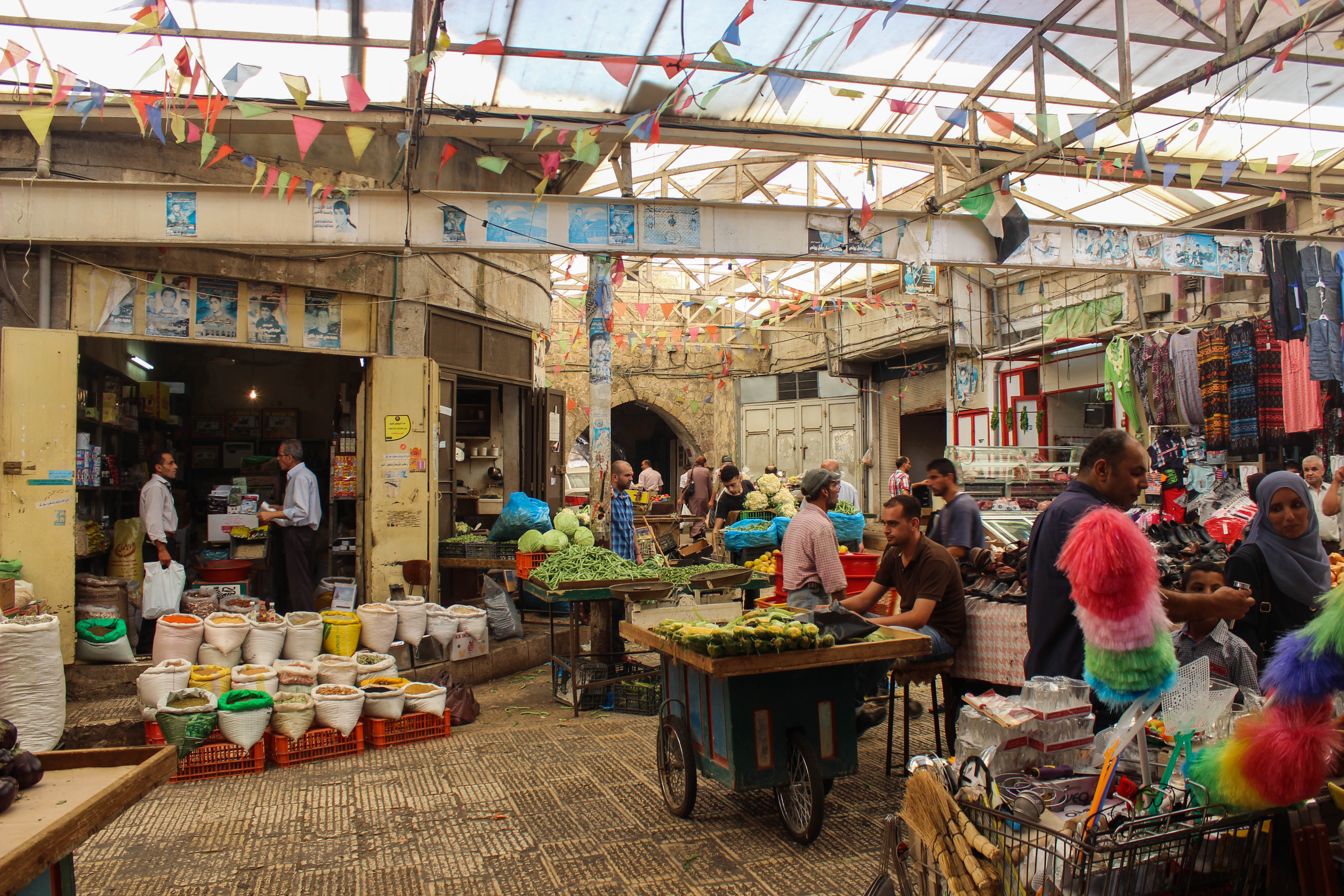 • إحدى الأسواق القديمة في مدينة نابلس. • تصوير: معتز توفيق اغبارية. • 12/08/2013